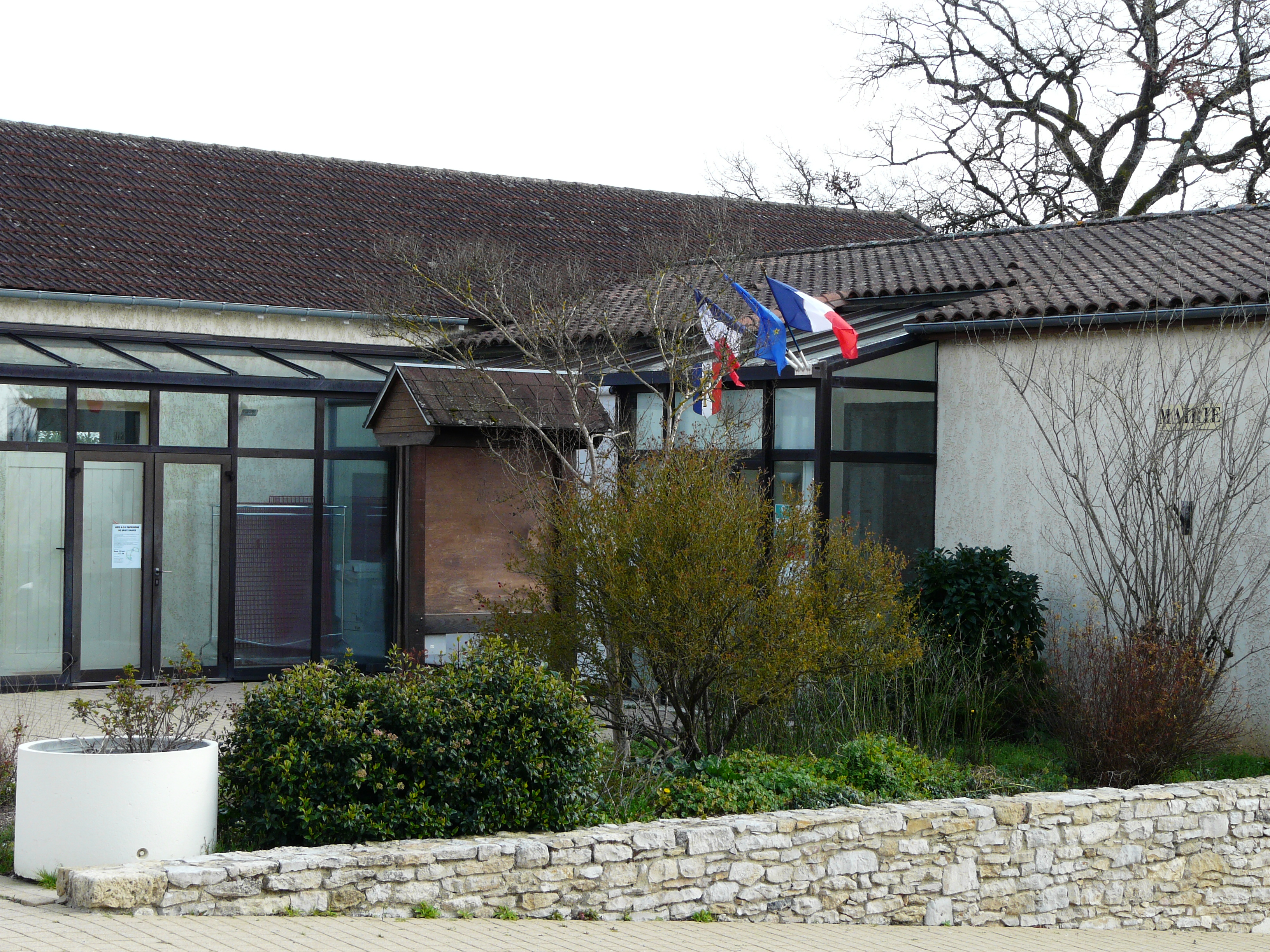 La mairie de Saint-Rabier, Dordogne, France.